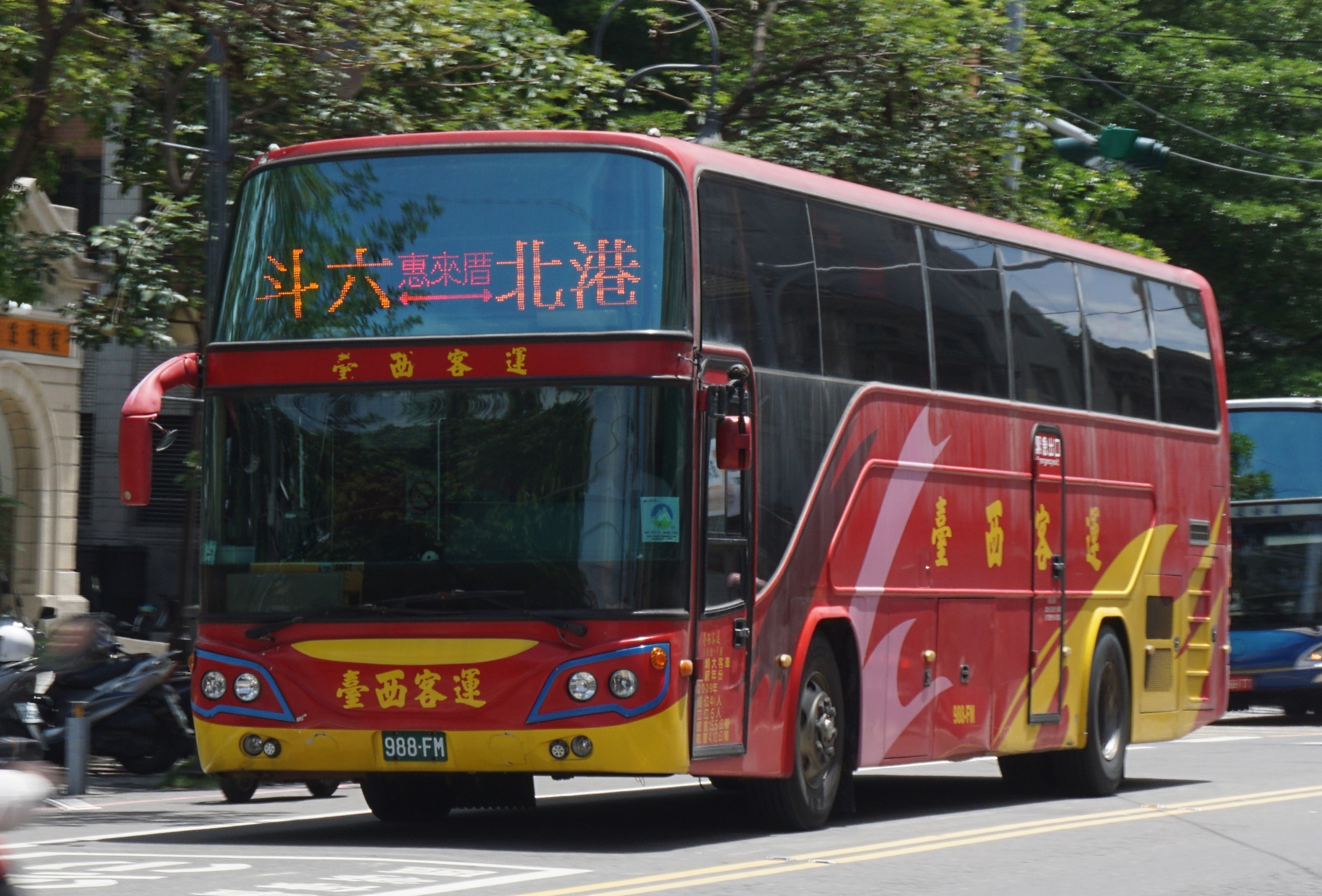 2009 FUSO RM11FNL 247PS 達興車體